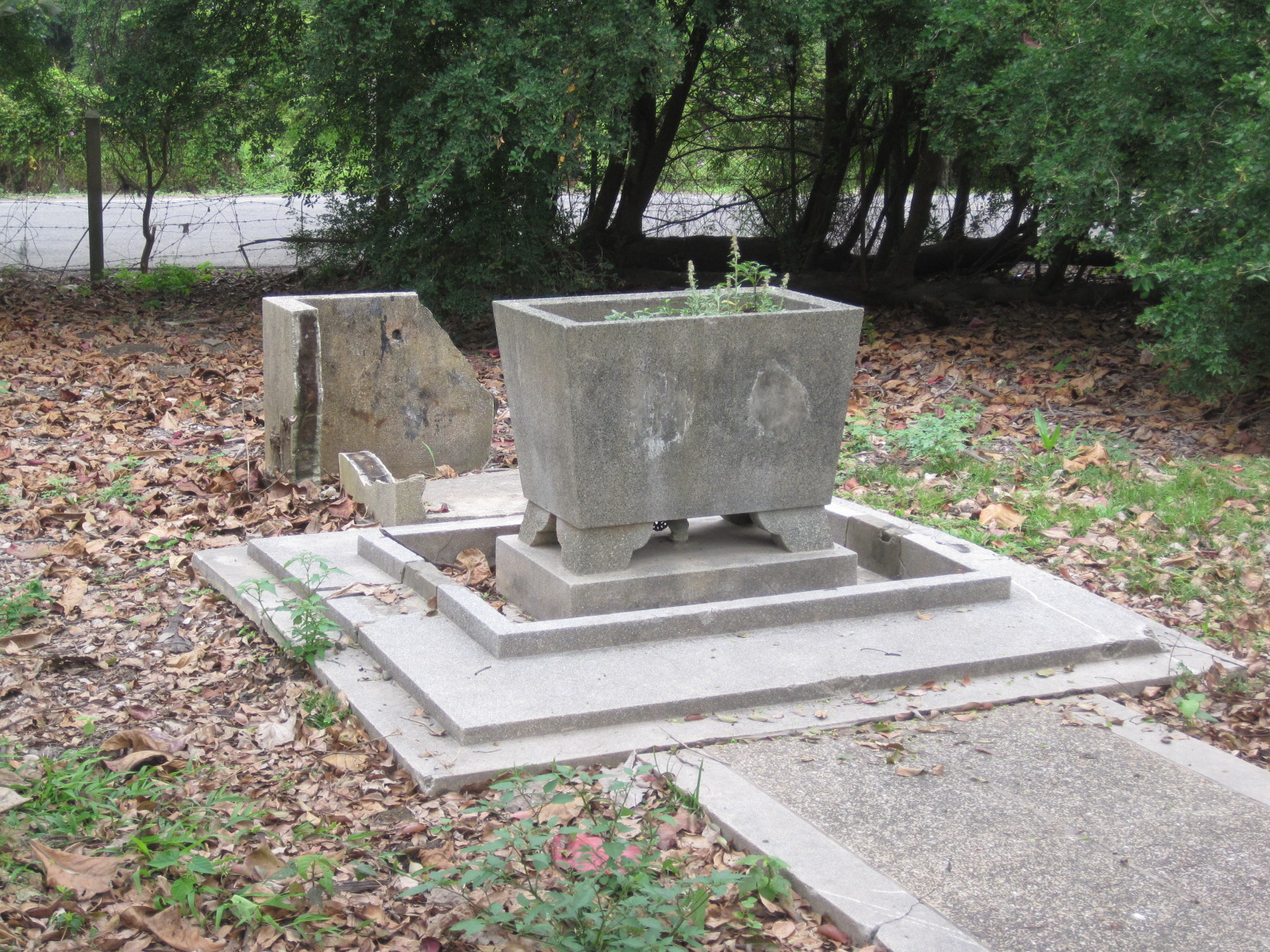 三崁店神社手水舍遺跡。